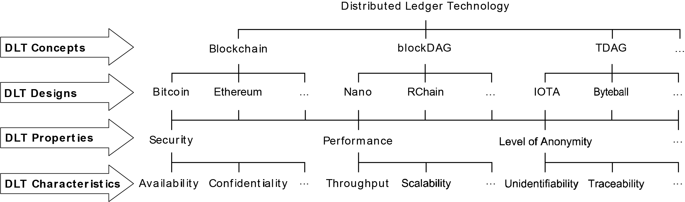 Diese Grafik zeigt die Tradeoffs von verschiedenen Implementierungen der Distributed-Ledger-Technologie, also die Vor- und Nachteile.